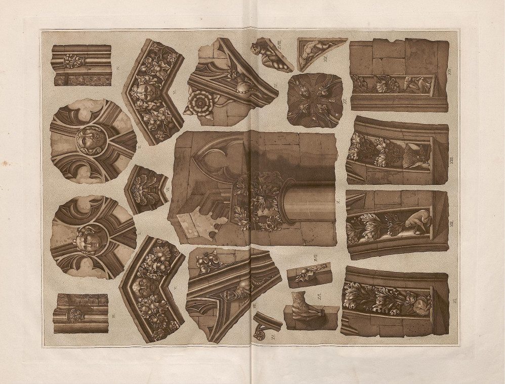 Tafel aus dem Buch:Die St.-Katharinen-Kirche zu Oppenheim: ein Denkmal teutscher Kirchenbaukunst aus dem 13. Jahrhundert; geometrisch und perspectivisch dargestellt und mit einem erläuterndem Texte begleitet